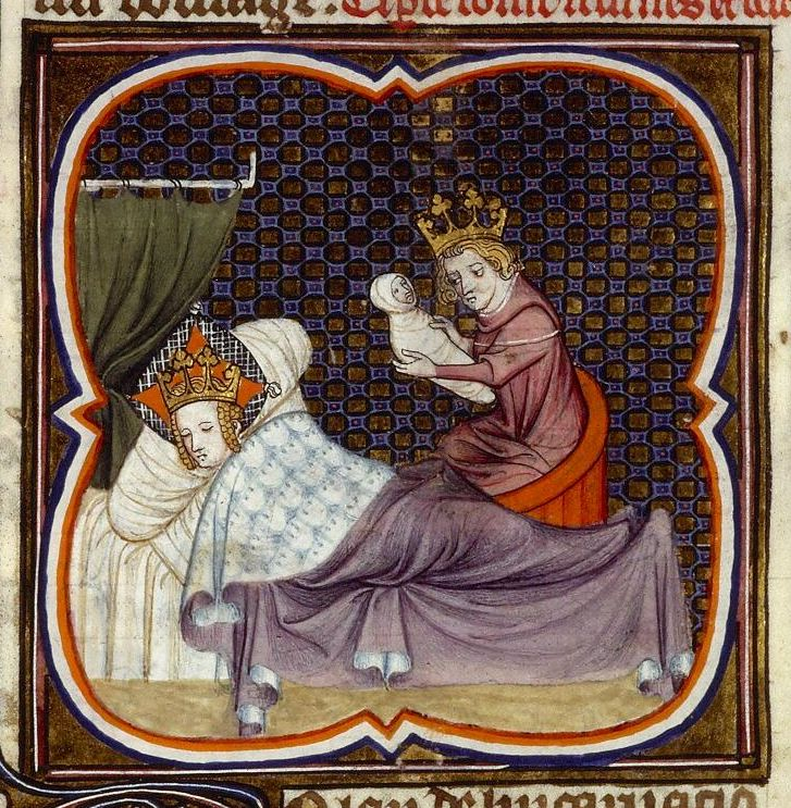 Philippe Auguste nouveau-né dans les bras de son père. La mère, épuisée par l'accouchement, se repose. Le père, émerveillé, contemple son descendant dans ses bras.